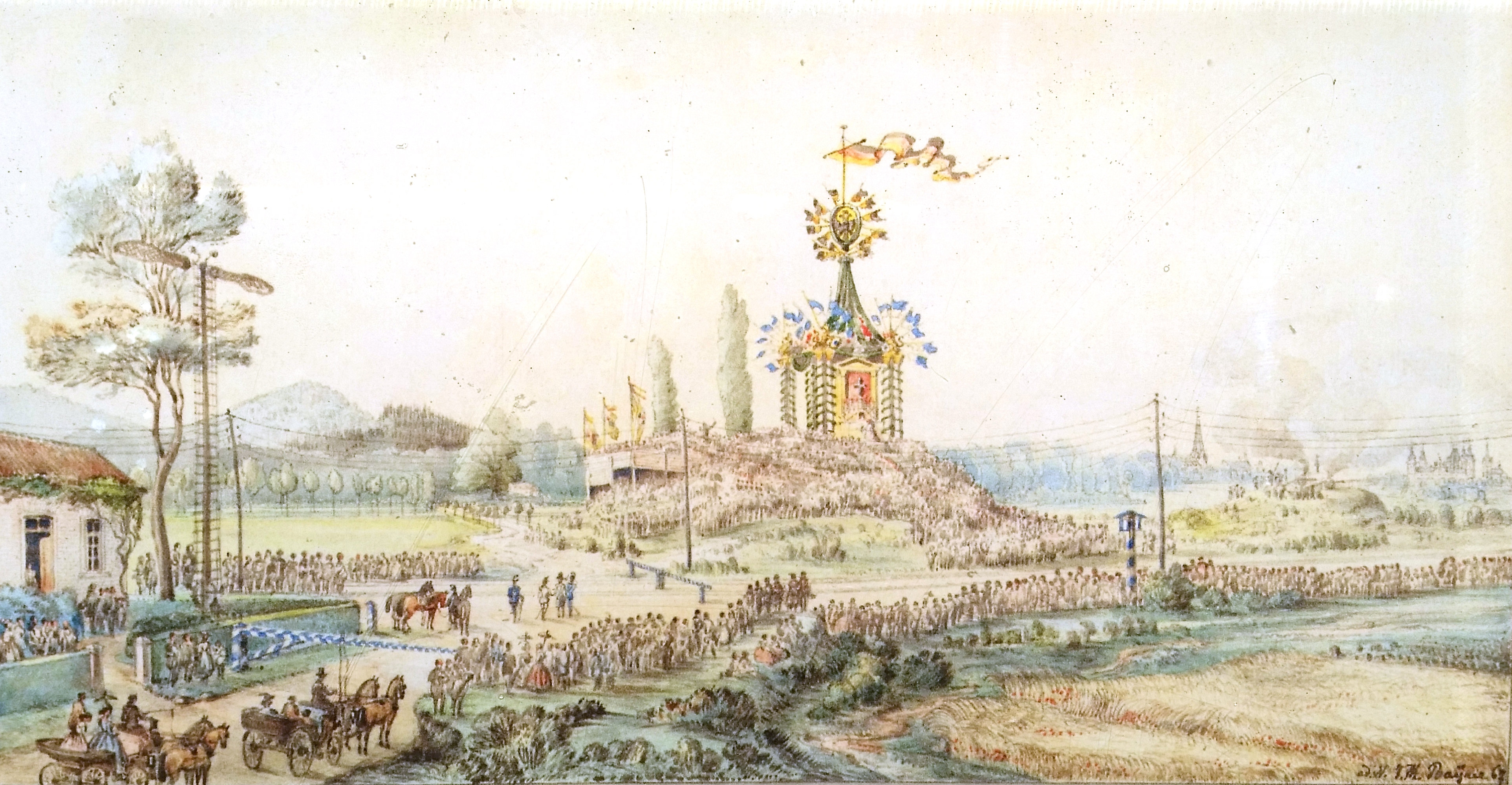 Aschaffenburg, Österreicher Denkmal, "Feier zur Grundsteinlegung" 1867, Federzeichnung, farbig laviert J. M. Bayer, 1867